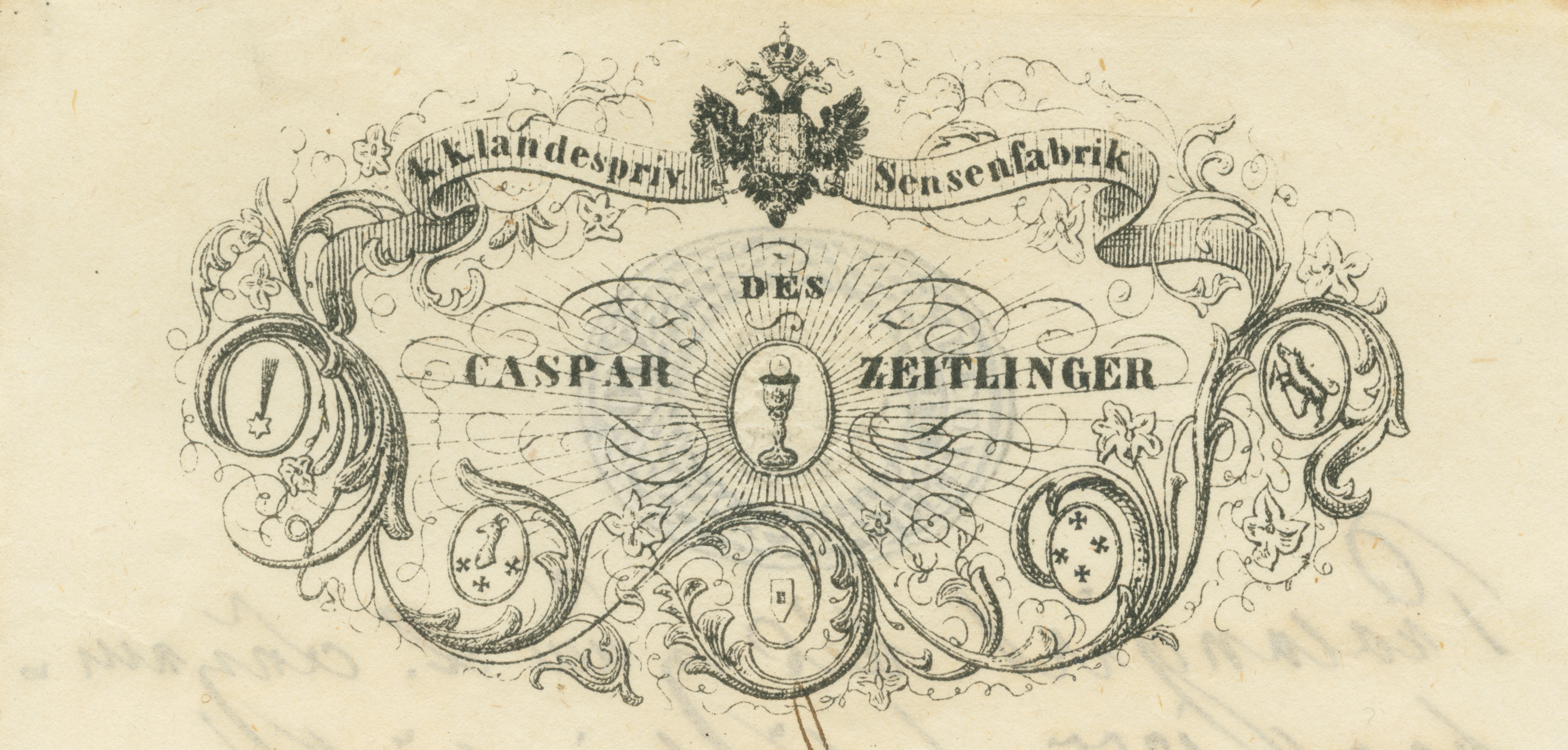 Briefkopf der k. k. landespriv. Sensenfabrik des Caspar Zeitlinger auf einem Wechsel von 1852. Die Markenzeichen verweisen auf die Werke Caspar Zeitlingers: In der Mitte das Stammwerk, die Sensenschmiede am Gries (Gradnwerk) mit dem Zeichen „Kelch mit Hostie“, darunter (von links nach rechts): Sensenschmiede Dürnbach oder Helmlwerk („Komet“), Sensenschmiede an der Zinne oder Weinmeisterwerk („Gamskopf“), Hammerschmiede Inzersdorf, Sensenschmiede am Stein oder Moserwerk („Himmelkreuz“) und Sensenschmiede Steinhub („Wildschwein“).